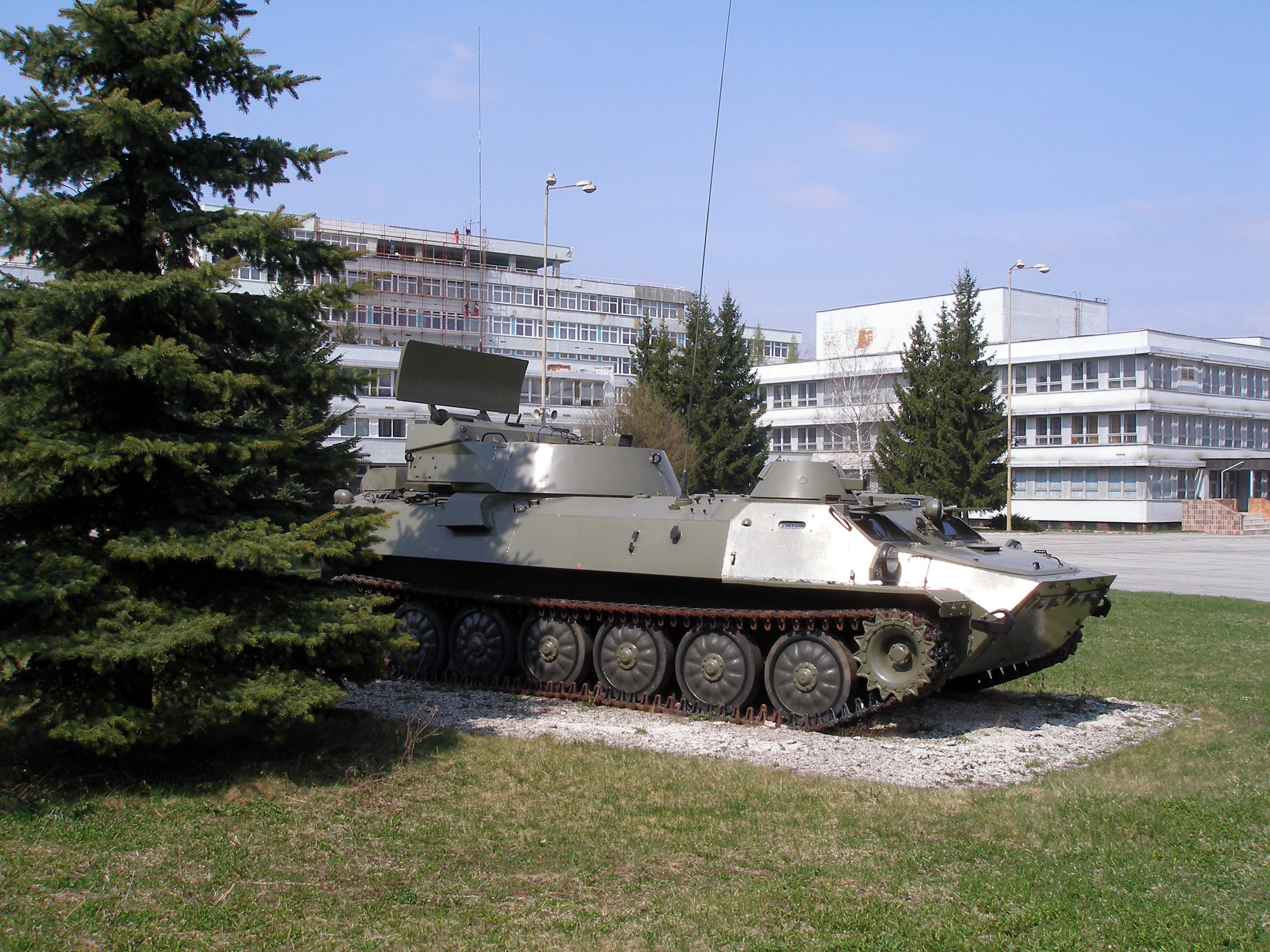 Akadémia ozbrojených síl generála Milana Rastislava Štefánika. Liptovský Mikuláš, Slovensko.